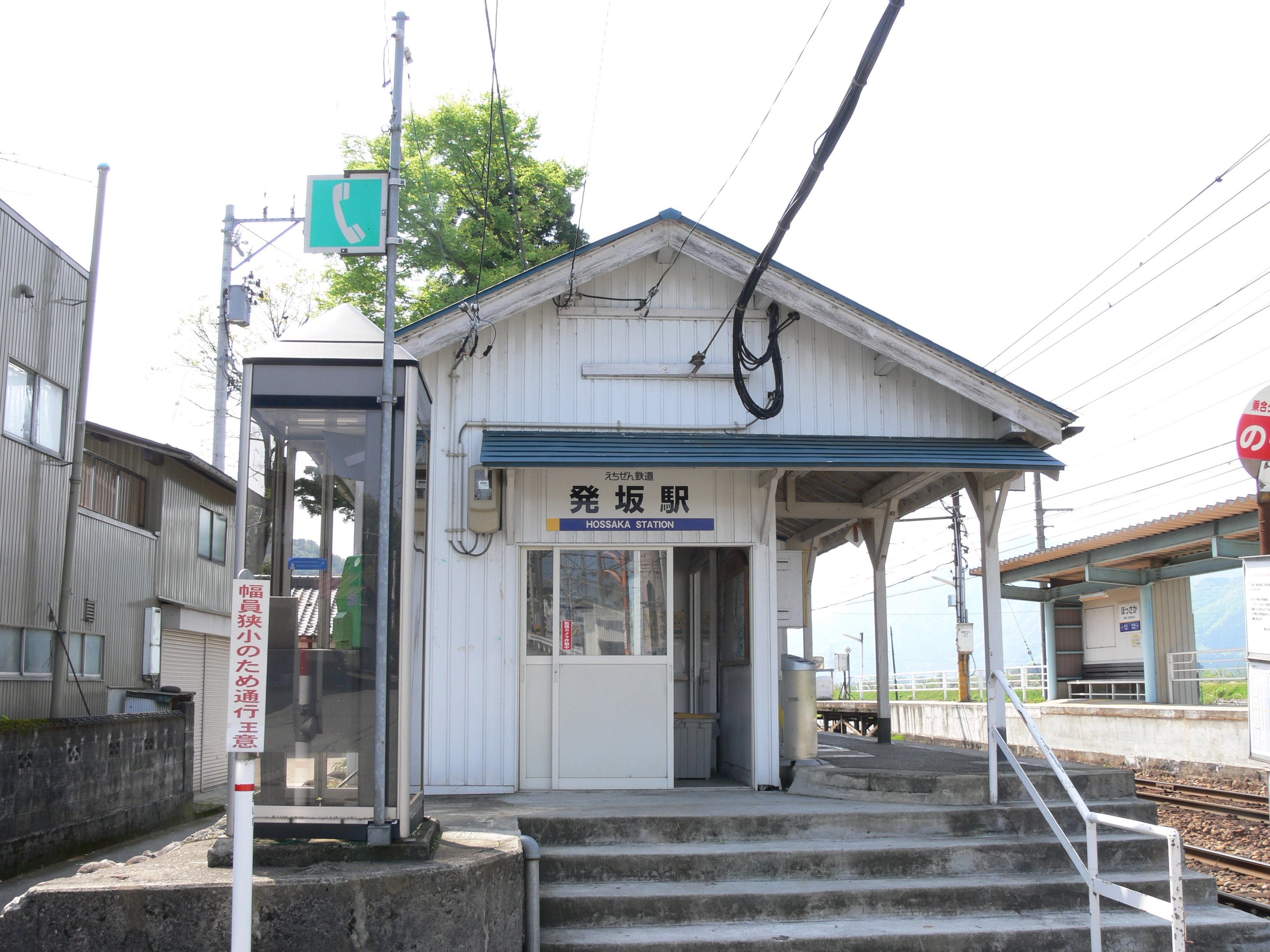 Hossaka Station